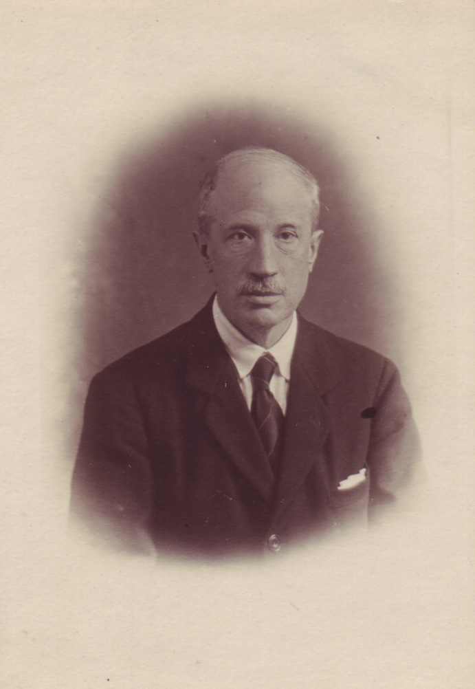 Archiatra di Pio X e PioXI